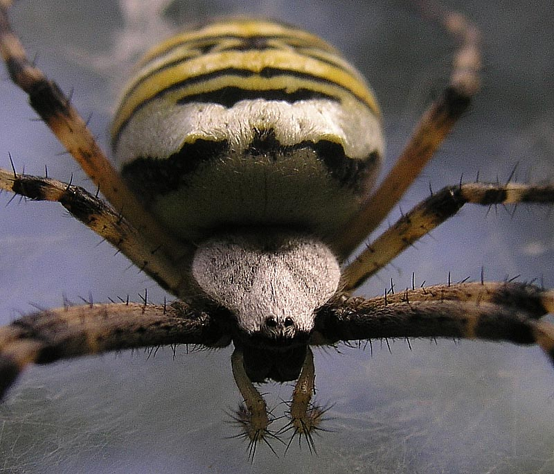 Weibliche Wespenspinne (Argiope bruennichi), aufgenommen am Hornberg in der Nähe vom Schwalbachswald in Buseck